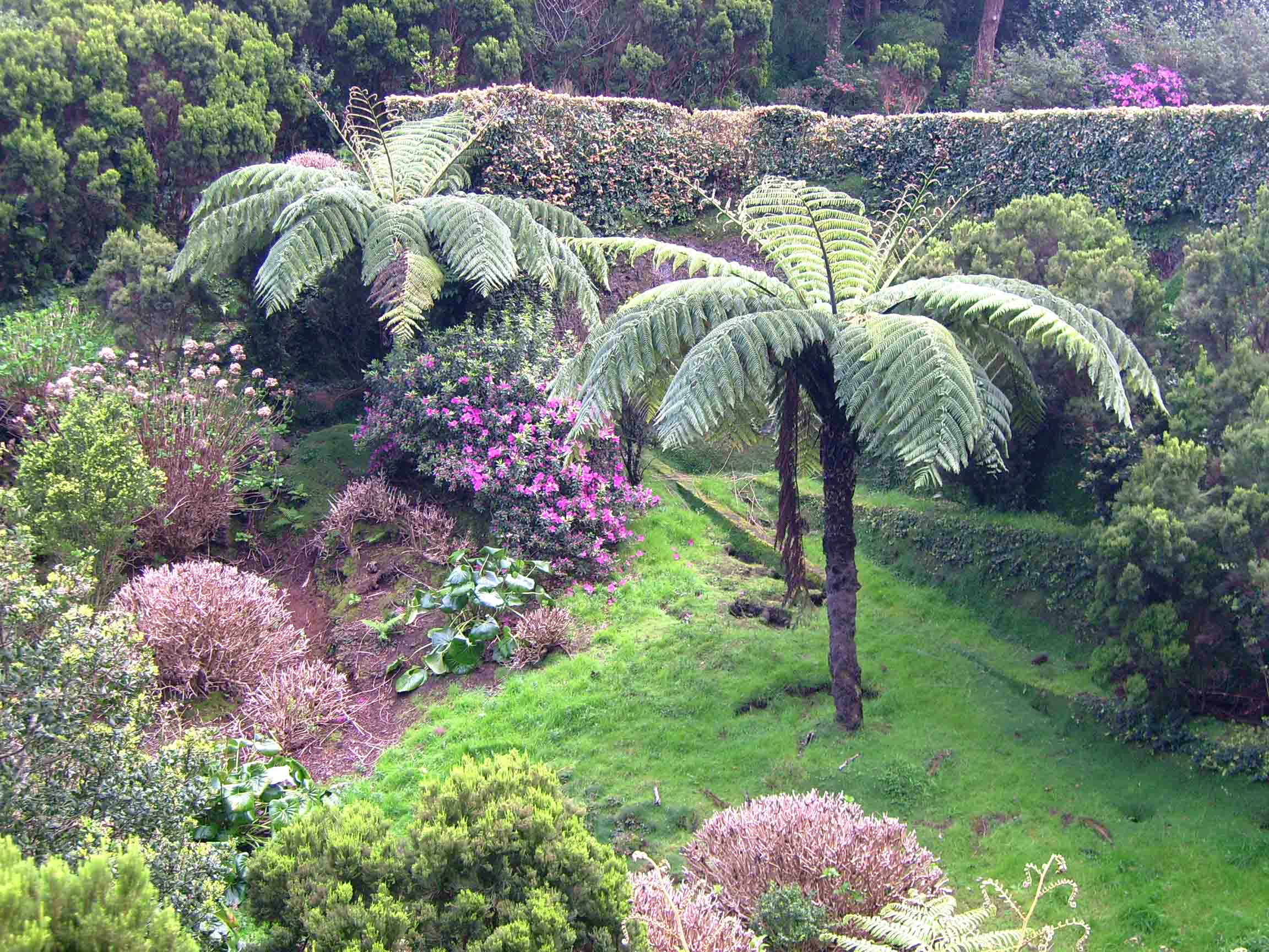 Feto arbóreo no Parque Florestal das Sete Fontes, ilha de São Jorge, Açores, Portugal